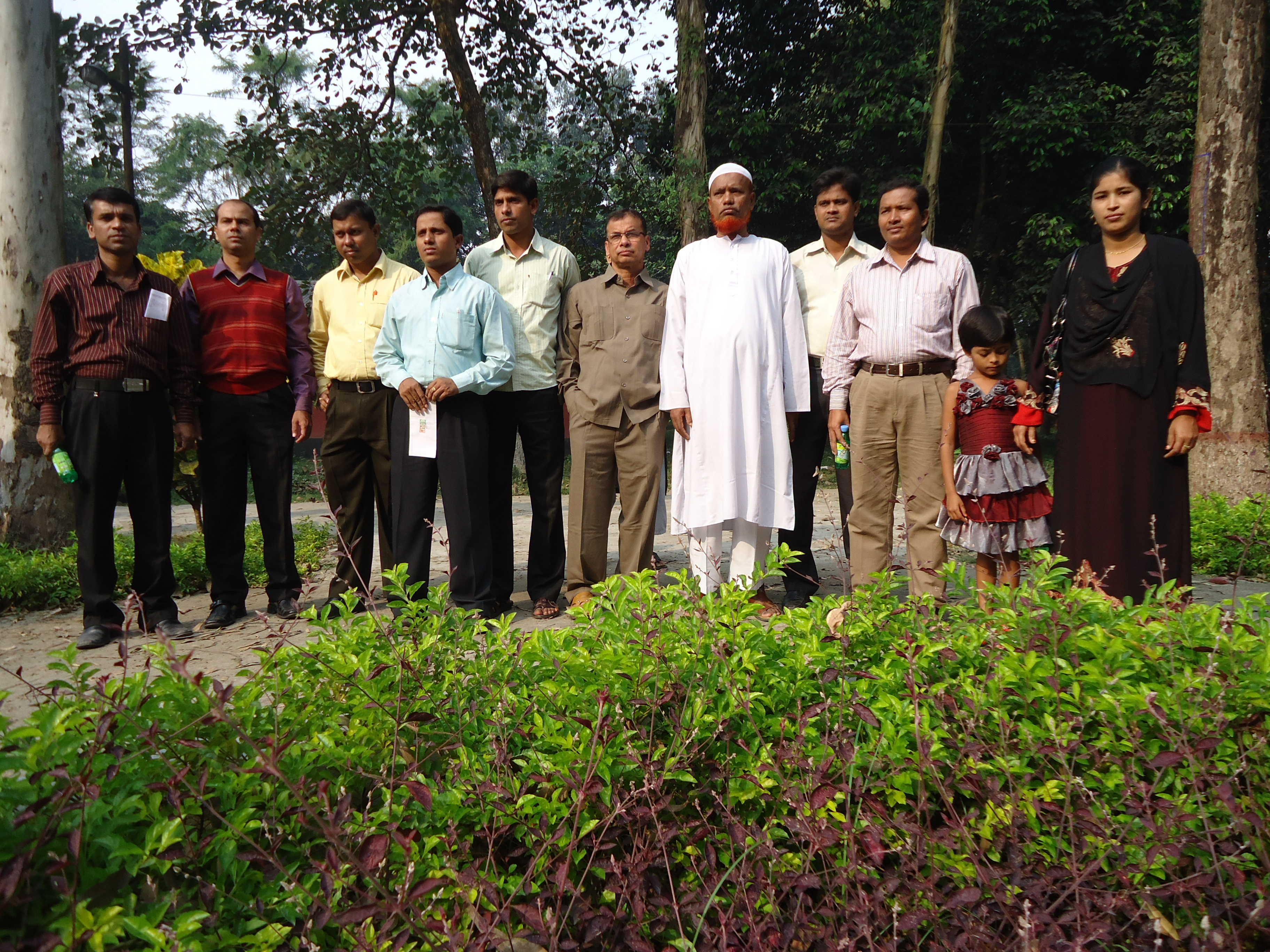 মোবারকগঞ্জ চিনিকল মাধ্যমিক বিদ্যালয়ের শিক্ষক মন্ডলীর একাংশ